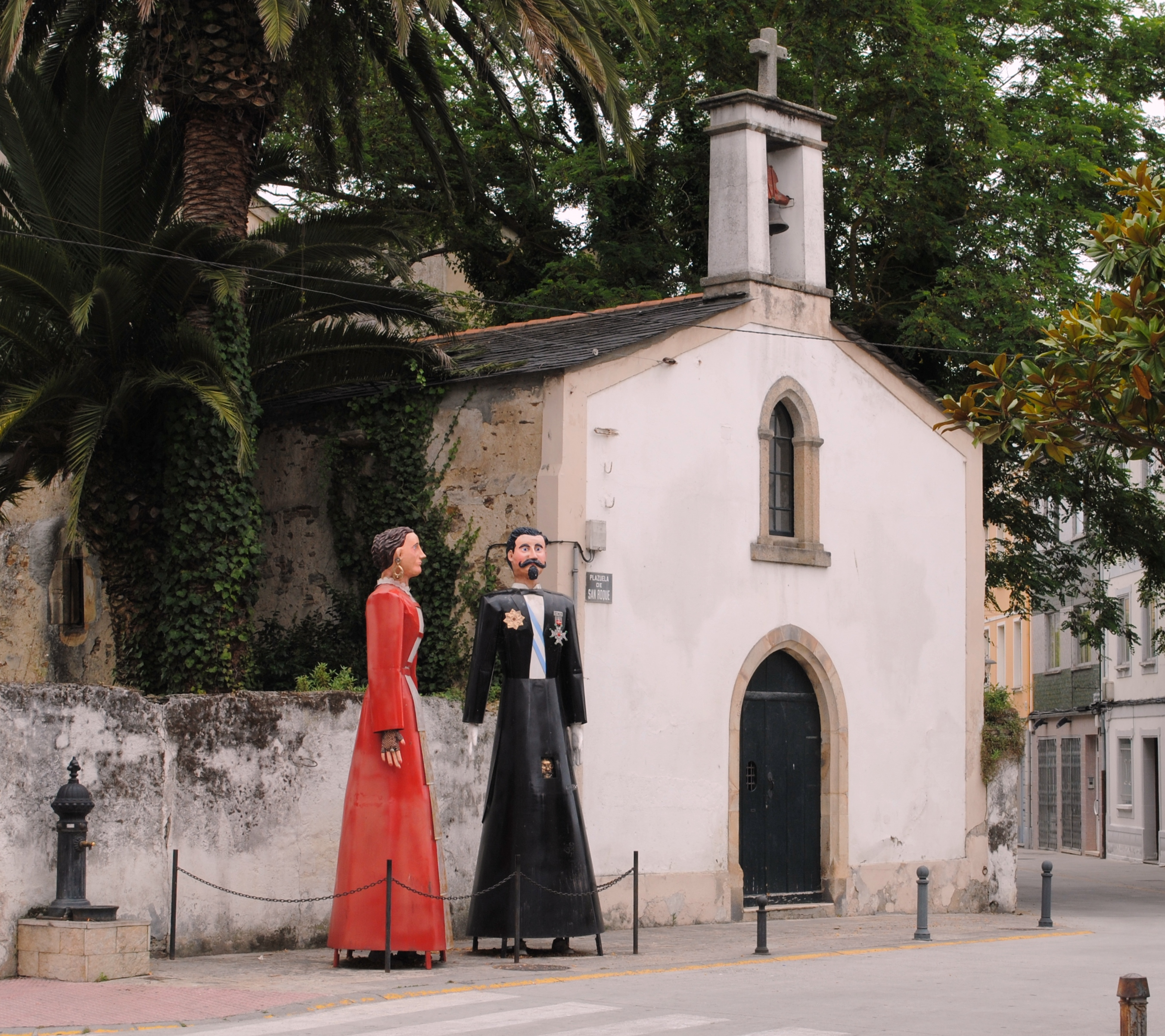 Véxase o título e as categorías